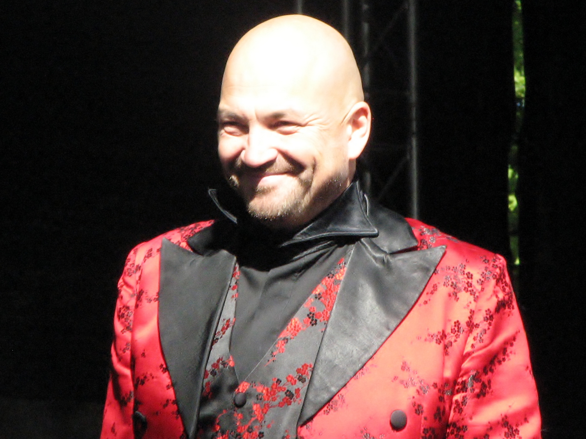 Mart Mikk esinemas Estonia teatri 107. hooaja avamisel